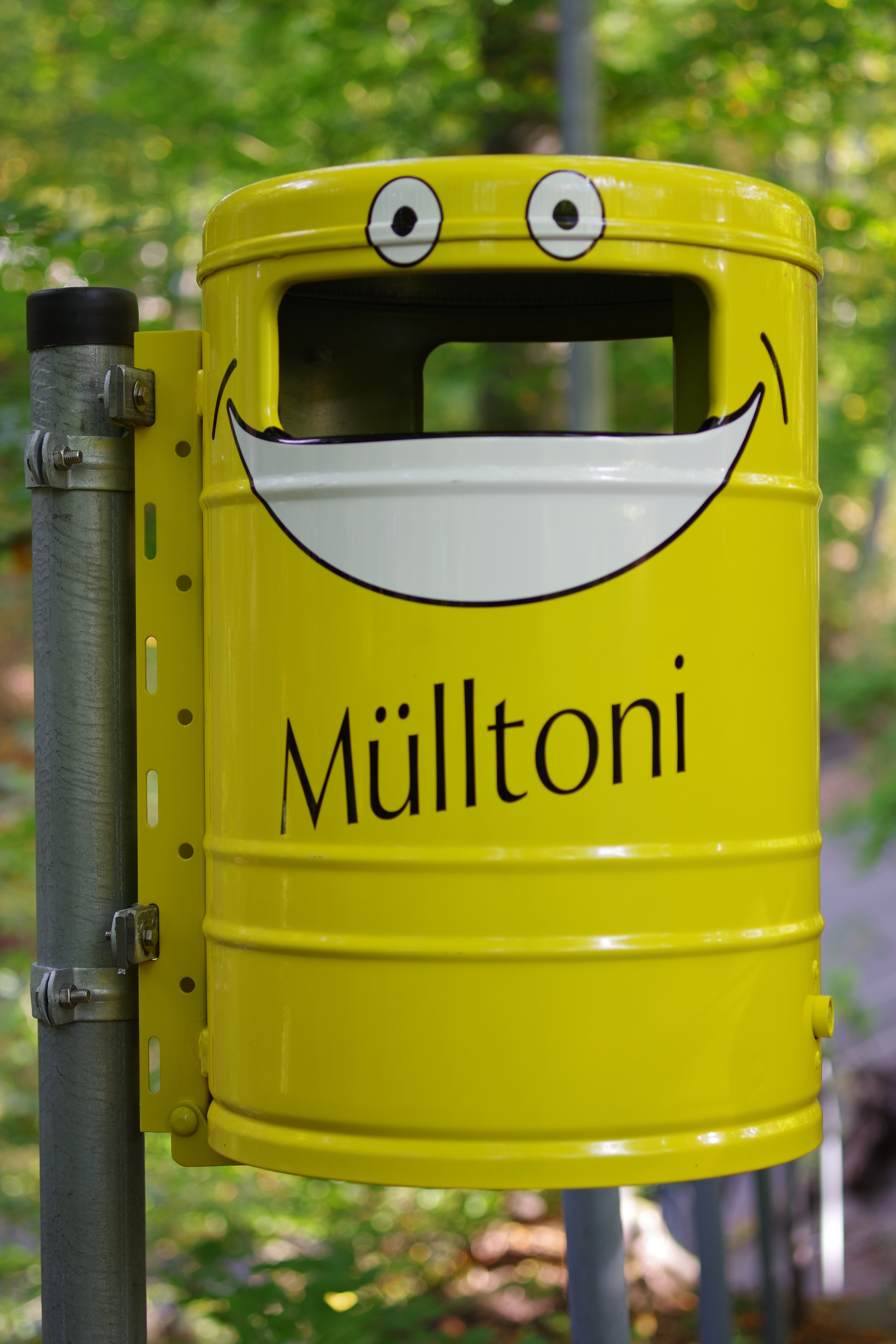 Bild eines Mülltonis in der Nähe des Krankenhaus in Sindelfingen. Fotografiert am 30.09.2017.